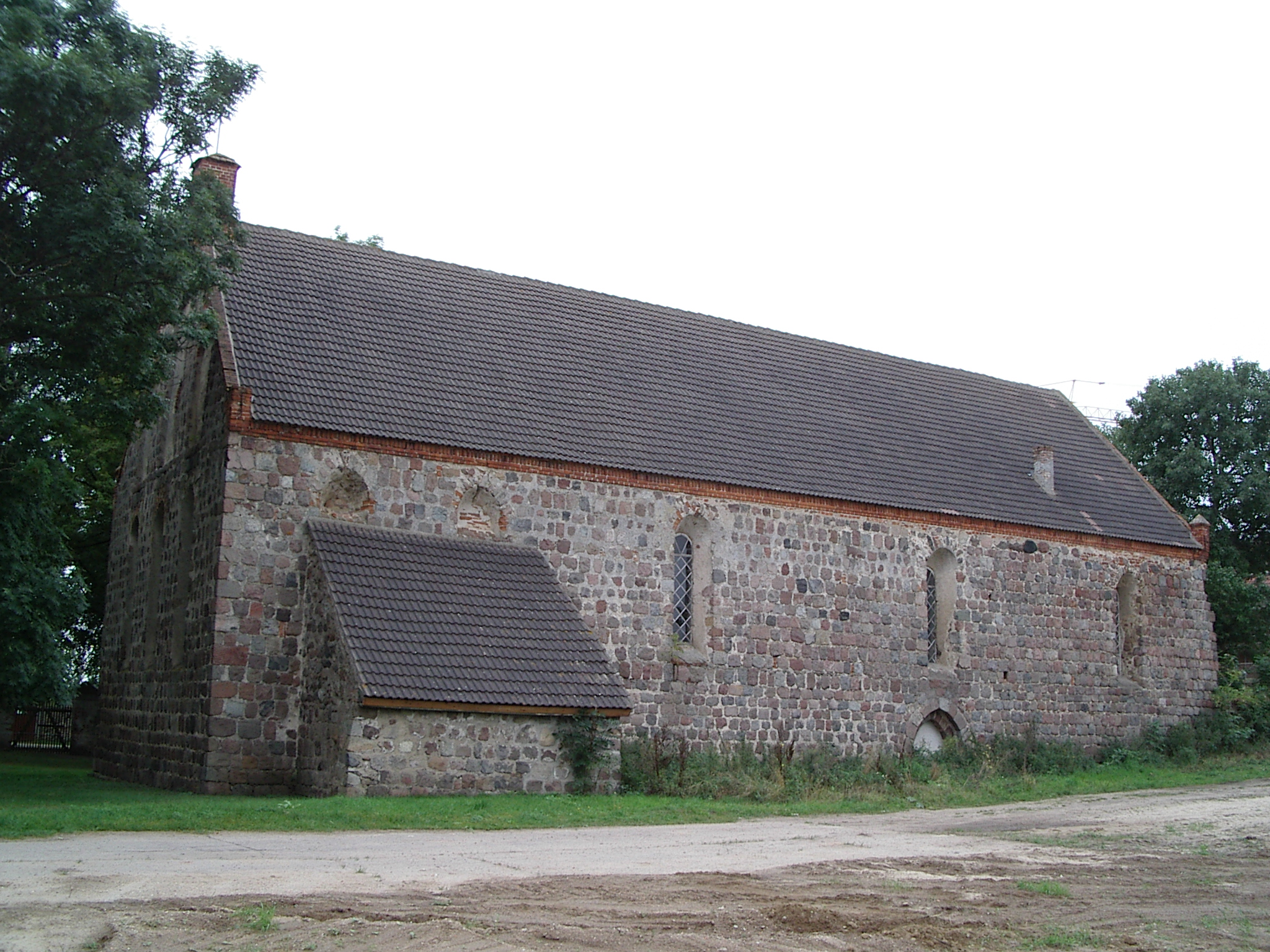 Eickstedt, Ansicht der Kirche von Nordosten